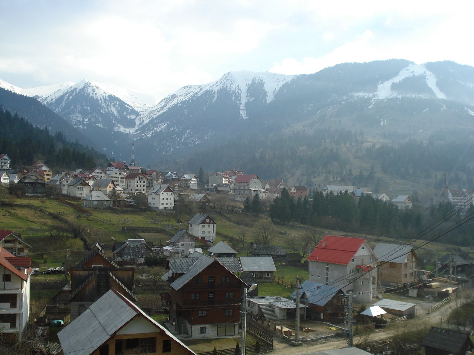 Borşa (ung. Borsa, dt. Borscha) ist eine Stadt im Bezirk Maramureş. Der Ort liegt im Tal des Vişeu-Flusses am Fuße des Rodna-Gebirges im Norden Rumäniens.